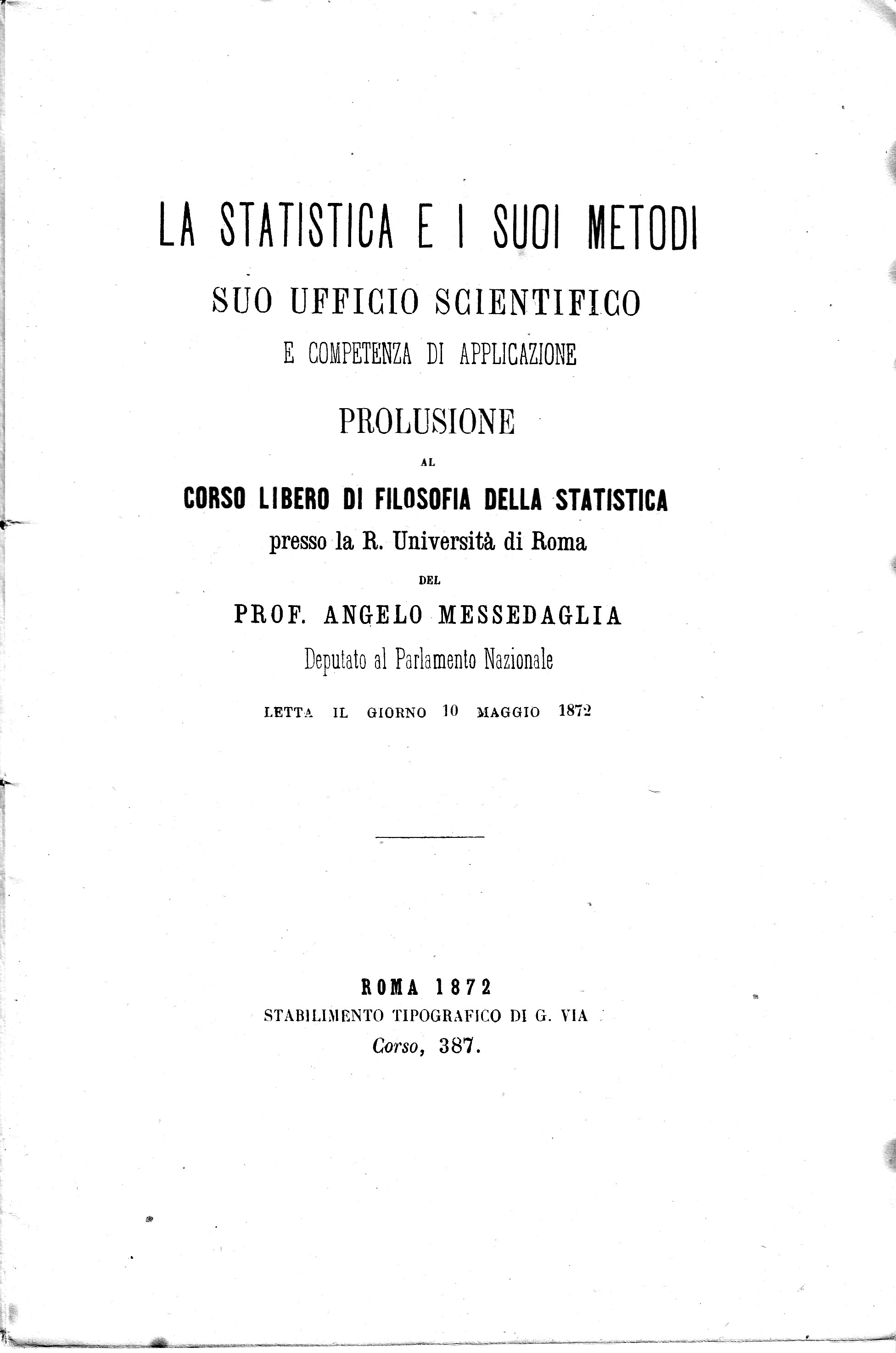 Scans from the book La Statistica e i suoi metodi, suo ufficio scientifico e competenza di applicazione - Prolusione al corso libero di filosofia della statistica presso la R. Università di Roma del prof. Angelo Messedaglia Deputato al Parlamento Nazionale, letta il giorno 10 maggio 1872